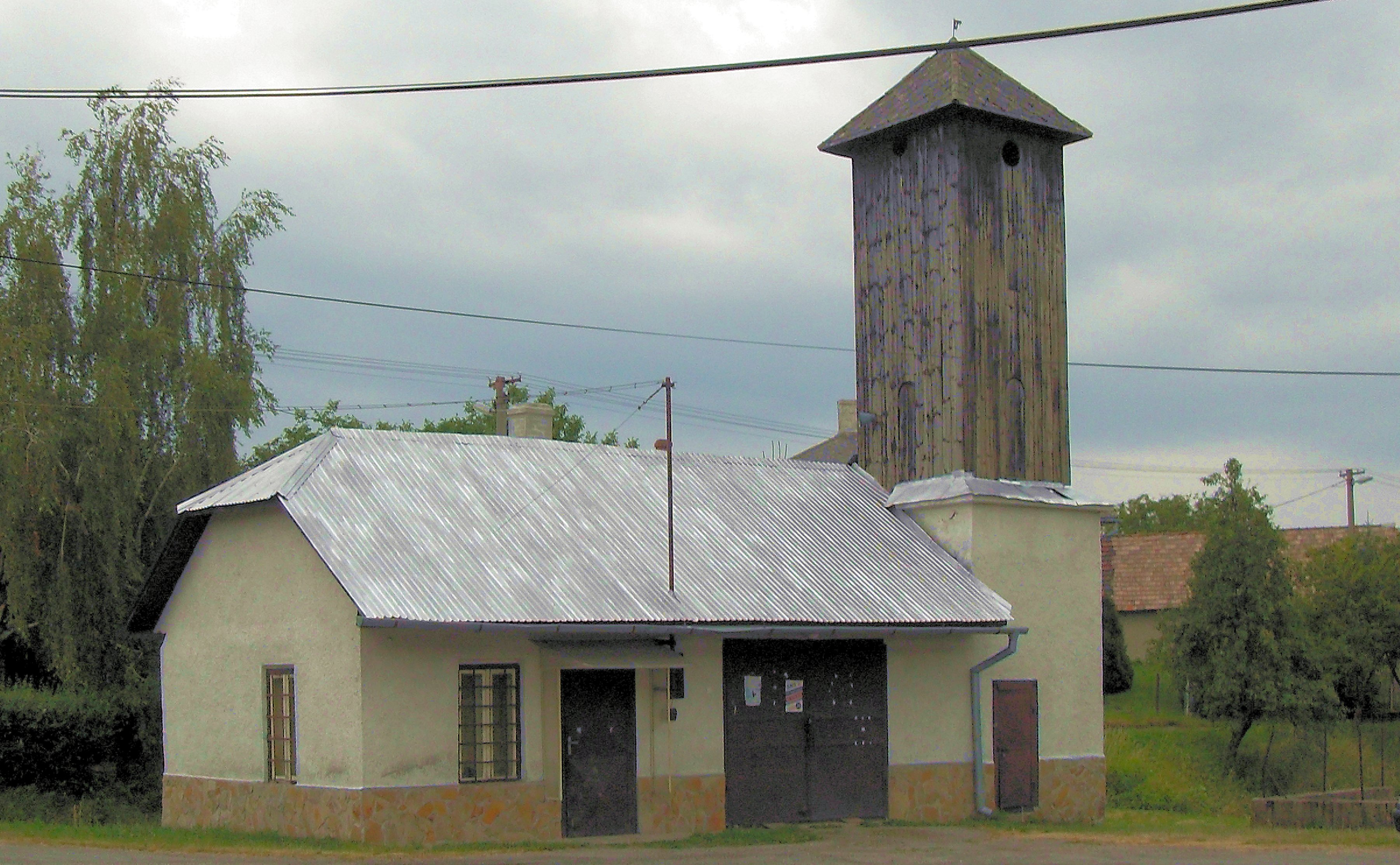 „Biely kostol“ v Kecerovský Lipovec